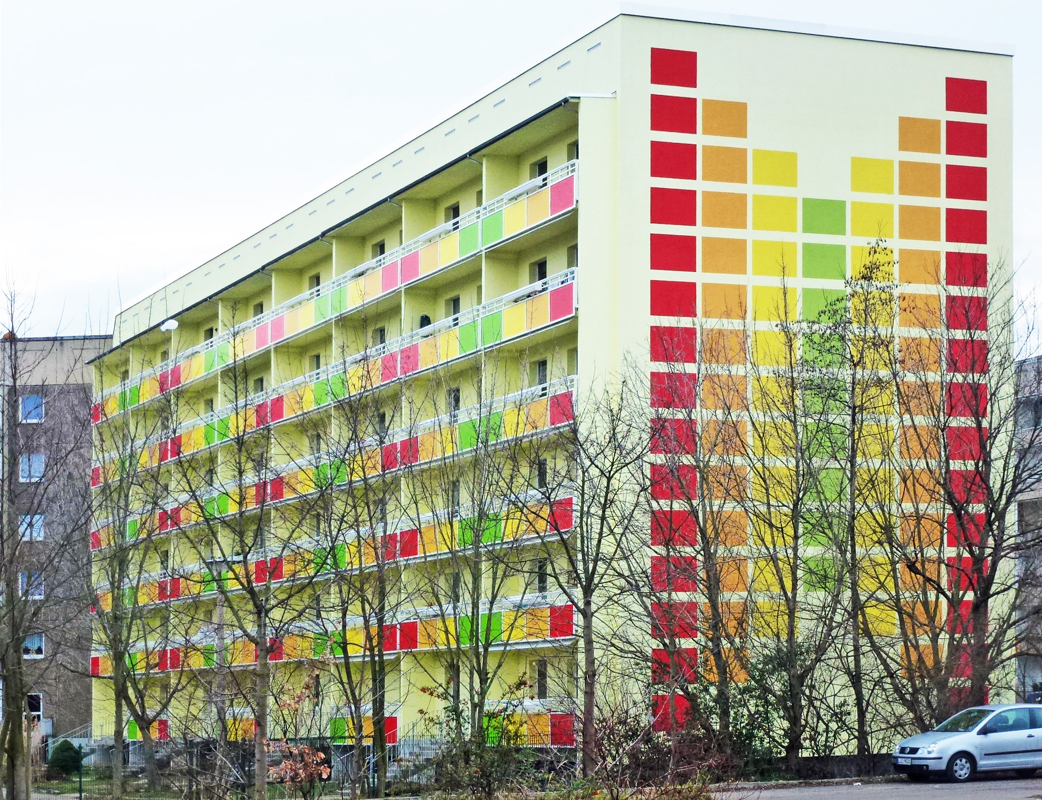 Farbenfroher Plattenbau in Leipzig-Grünau, WK 7